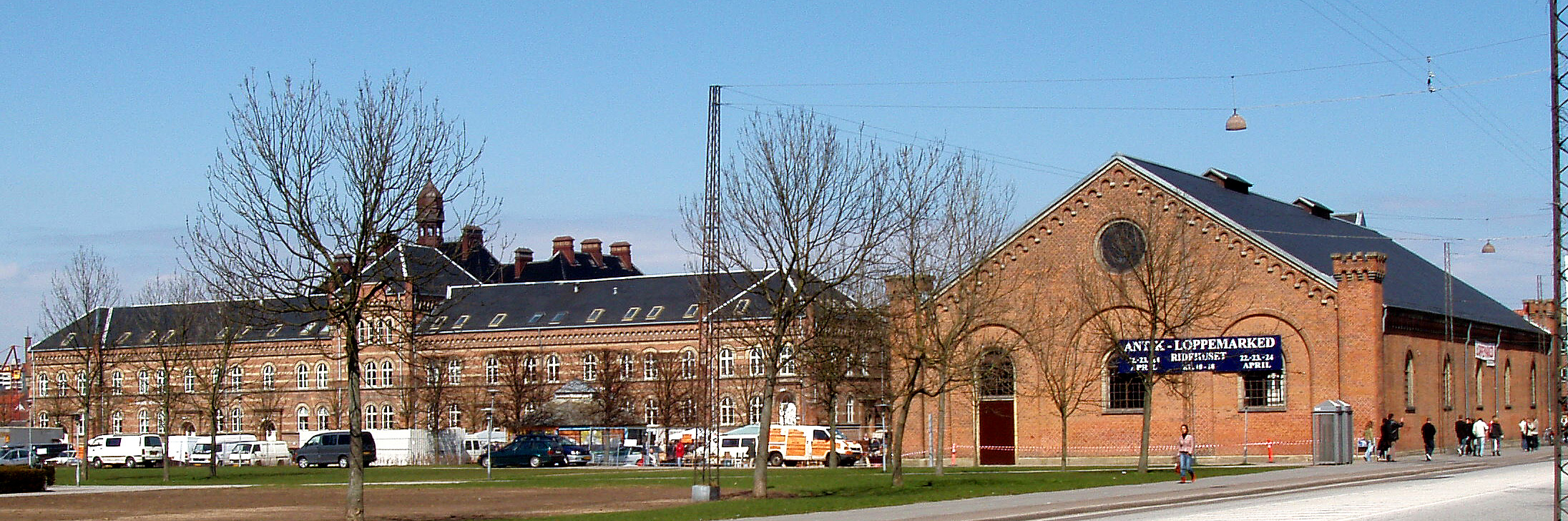 Kassernen Vesterallé set fra Fredrikallé , Aarhus